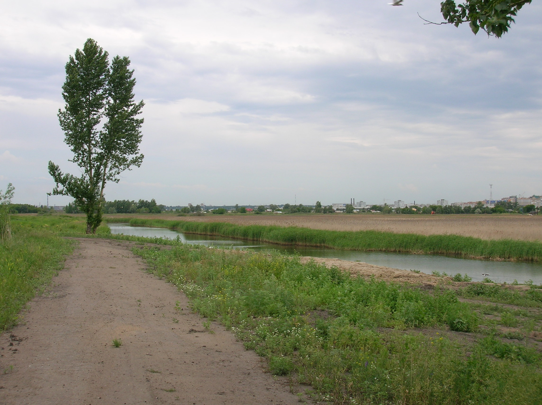 Природный парк «Птичья гавань» летом.